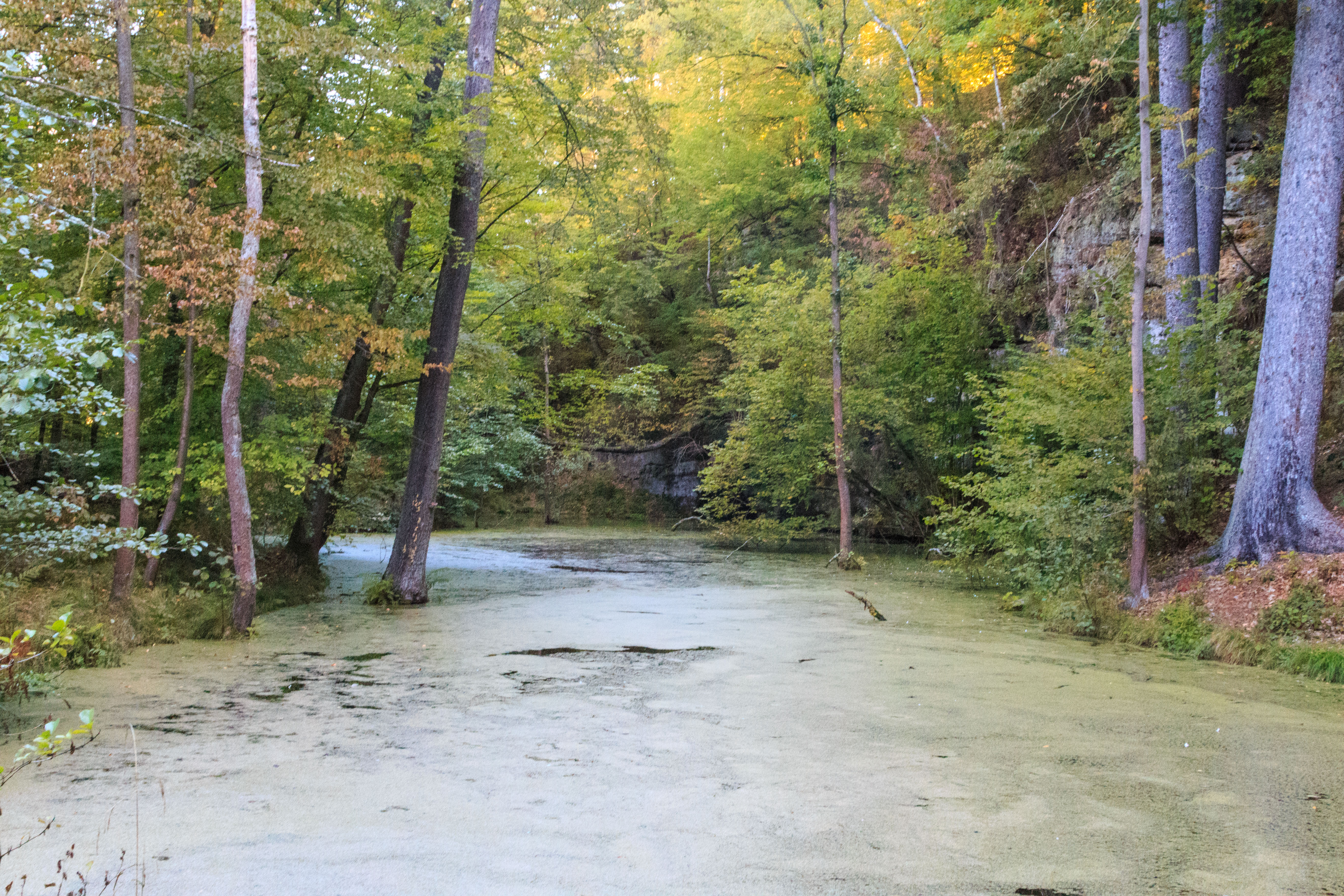 Černé jezírko ve Lvové Project: Vodstvo.